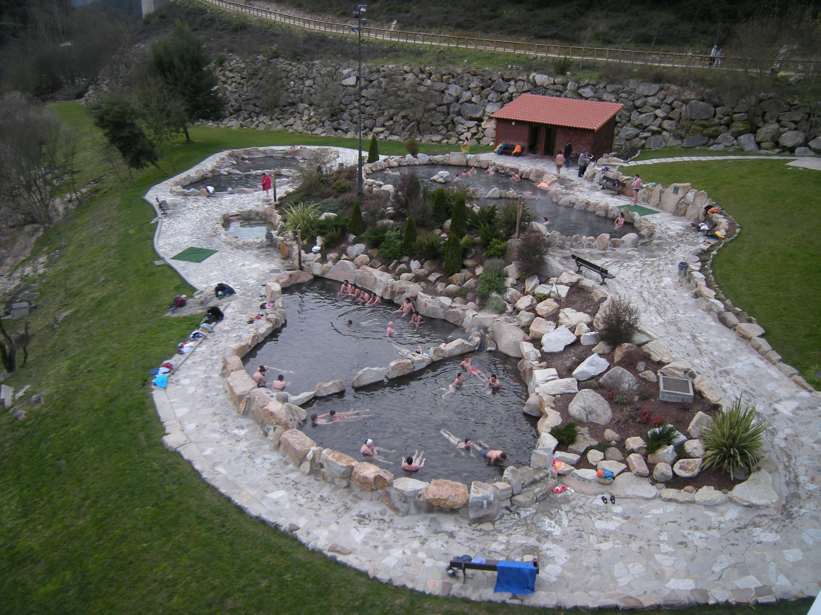 Termas de Outariz, Canedo, Ourense